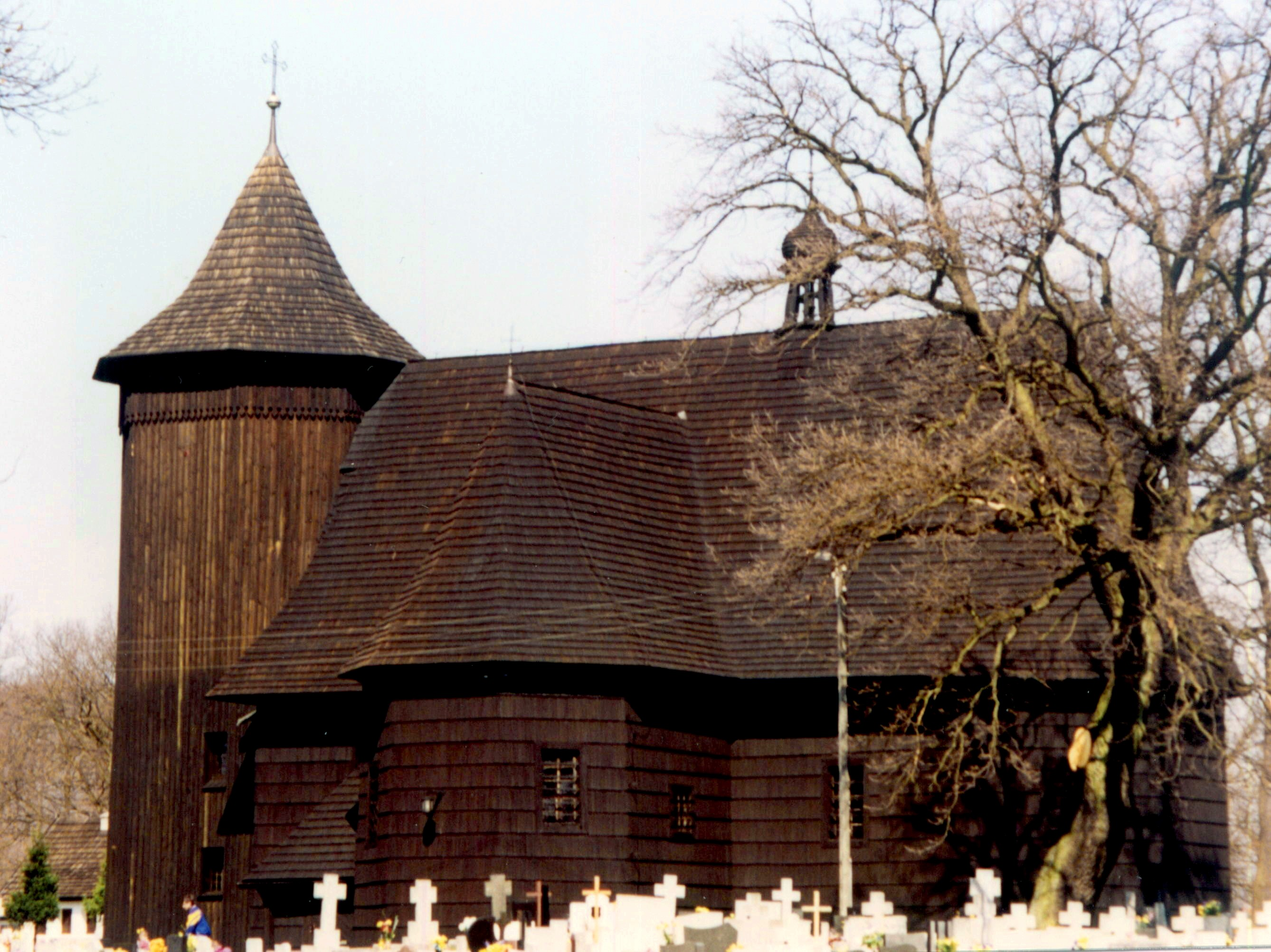 Kościół_MBR_w_Boronowie